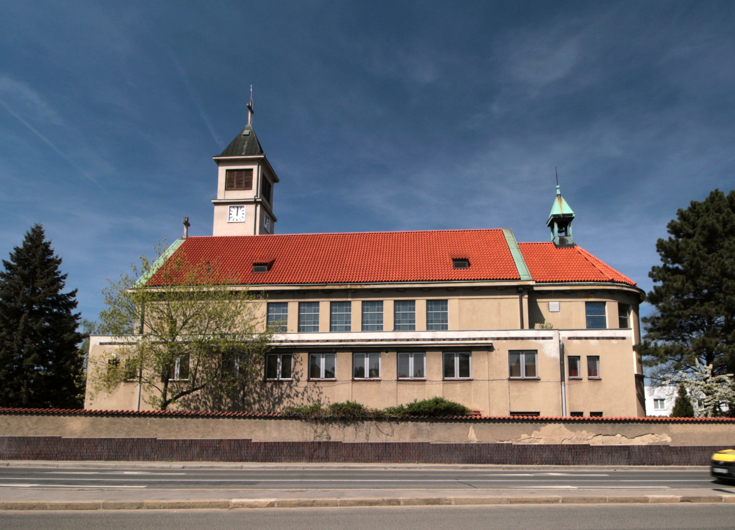 Kostel Panny Marie Královny míru, Praha 4-Lhotka